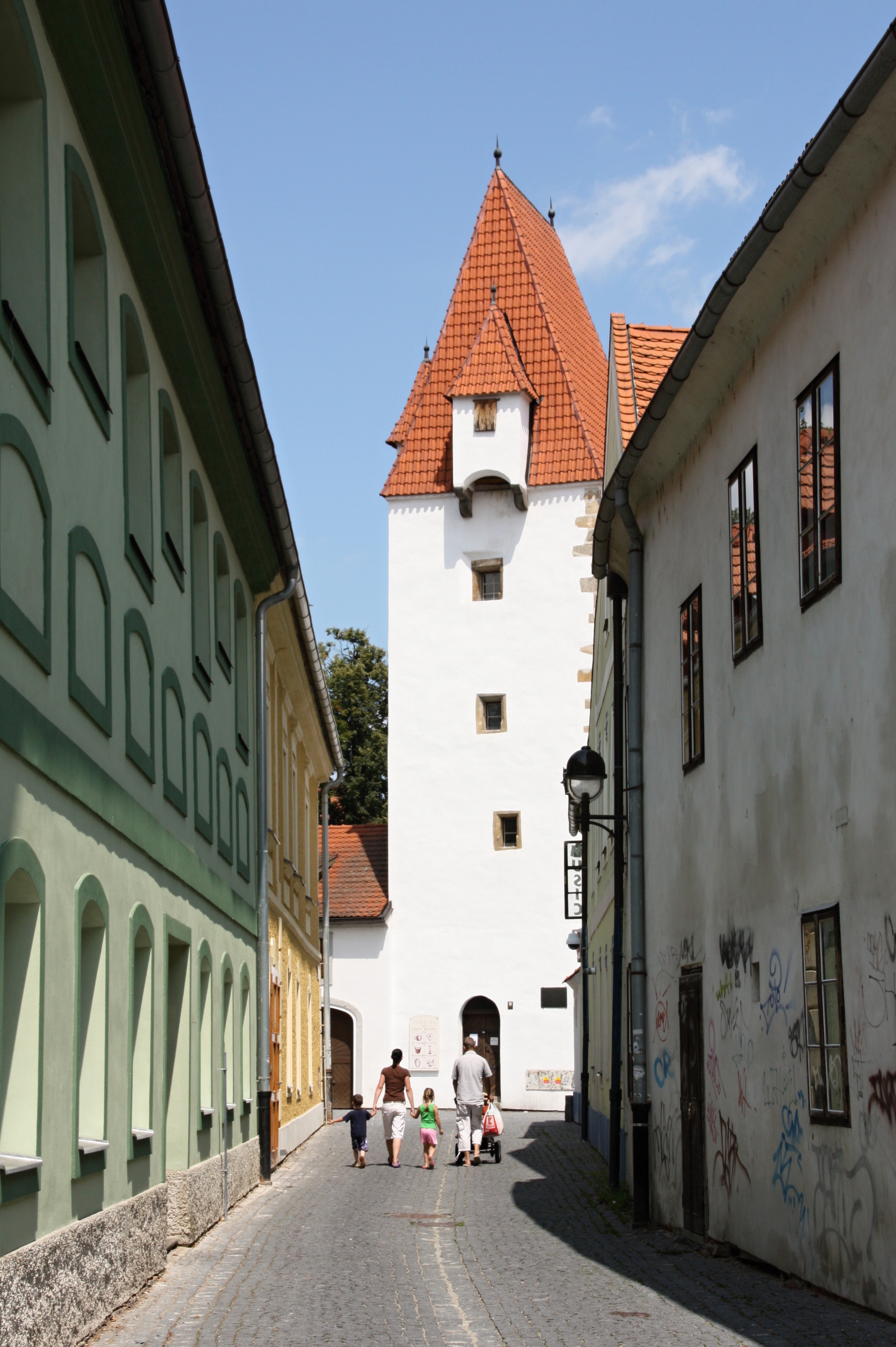 Městské opevnění Hradební zeď Otakarka Solná branka 2 hradební bašty Bašta ve zdi divadla Rabenštejnská věž Železná panna, Zátkovo nábřeží, Panská